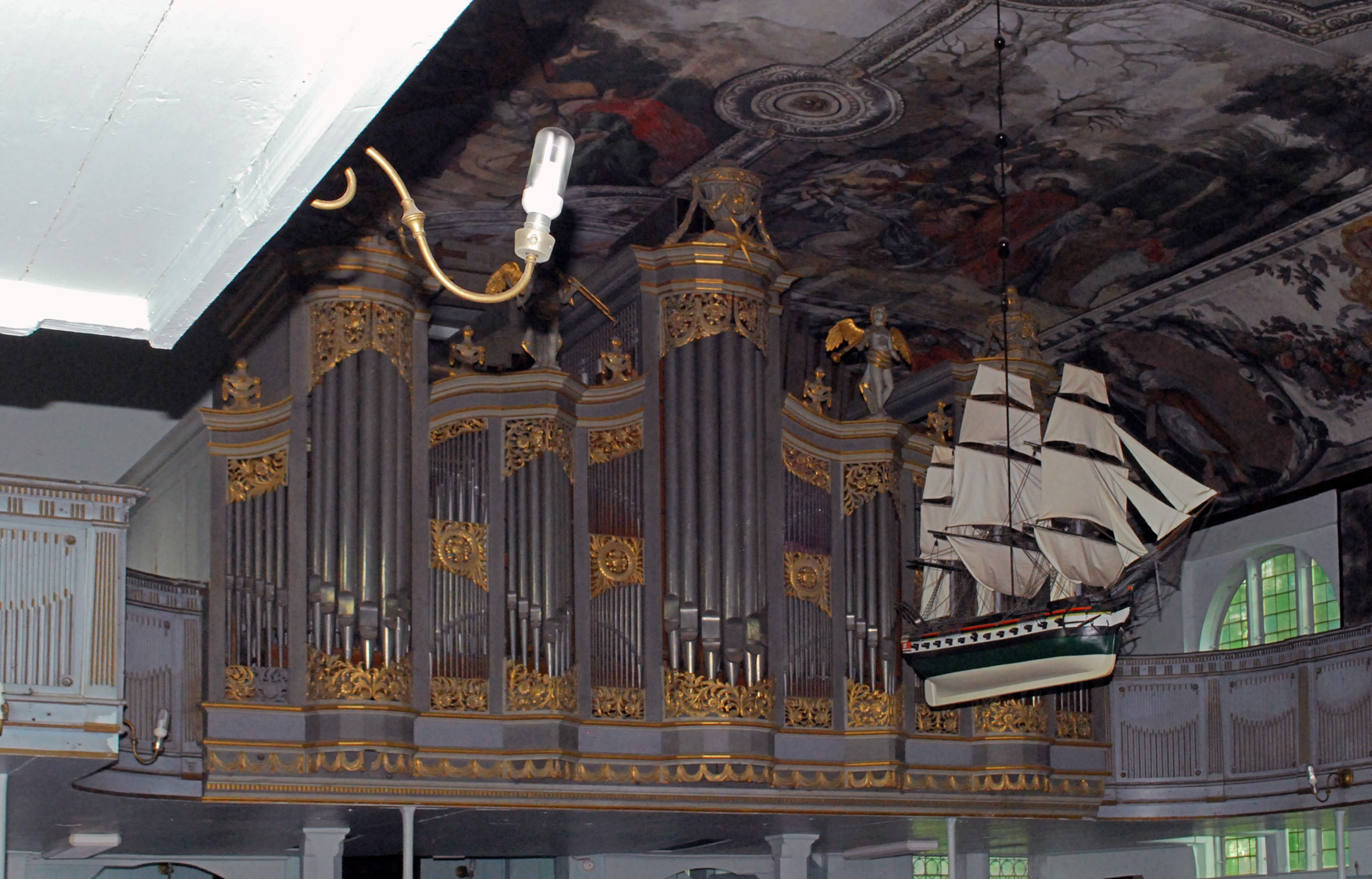 Stegna, ul. Gdańska 1 - wnętrze dawnego kościoła ewangelickiego, obecnie rzymskokatolickiego parafialnego p.w. Najświętszego Serca Pana Jezusa, 1682-1683